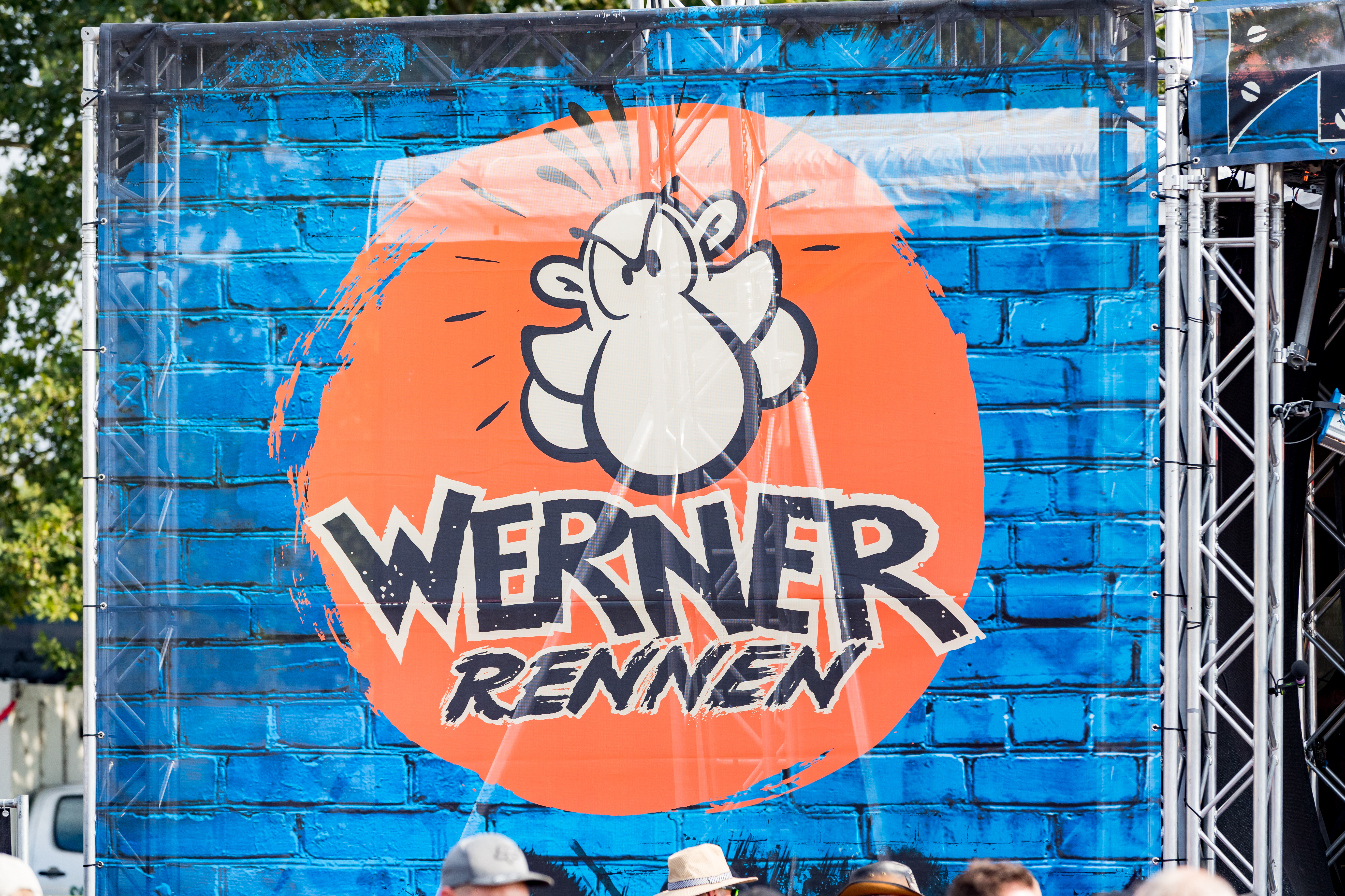 Festivalgelände during Werner Rennen at Flugplatz Hartenholm, Hasenmoor, Schleswig-Holstein, Germany on 2019-08-29, Photo: Sven Mandel